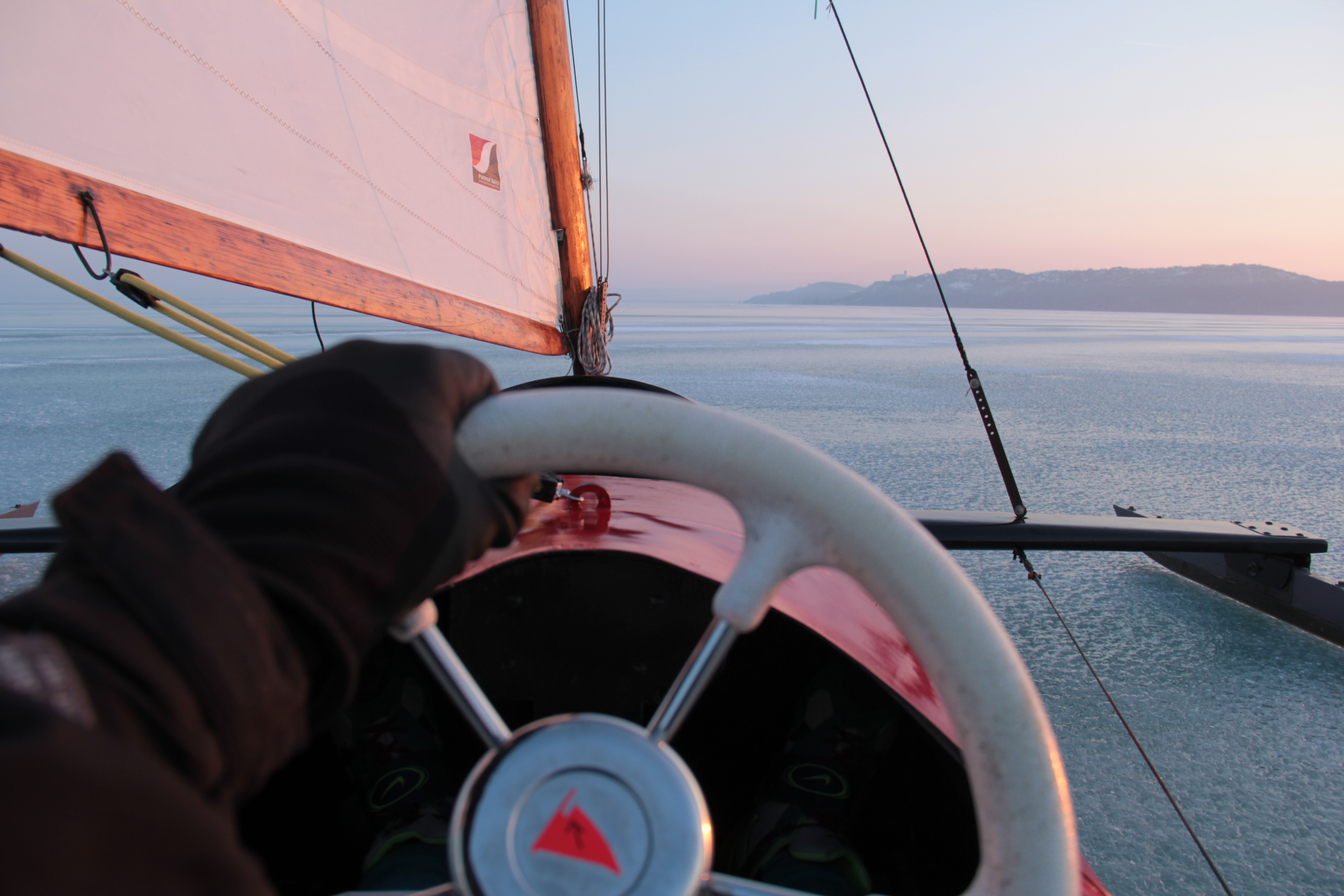 The cockpit view from a Monotype XV on Lake Balaton, Hungary